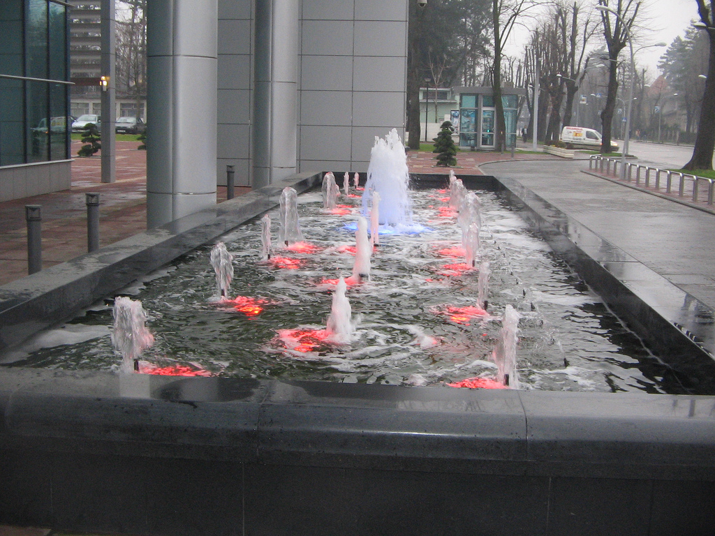 Fontana_ispred_zgrade_Vlade_RS.